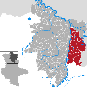 Verwaltungsgemeinschaft Elbe-Havel-Land in Sachsen-Anhalt - Landkreis Stendal